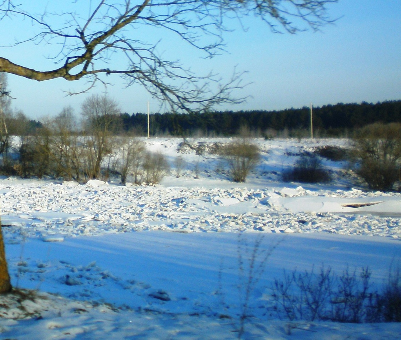 Ledų sangrūda Neryje ties Gegužine